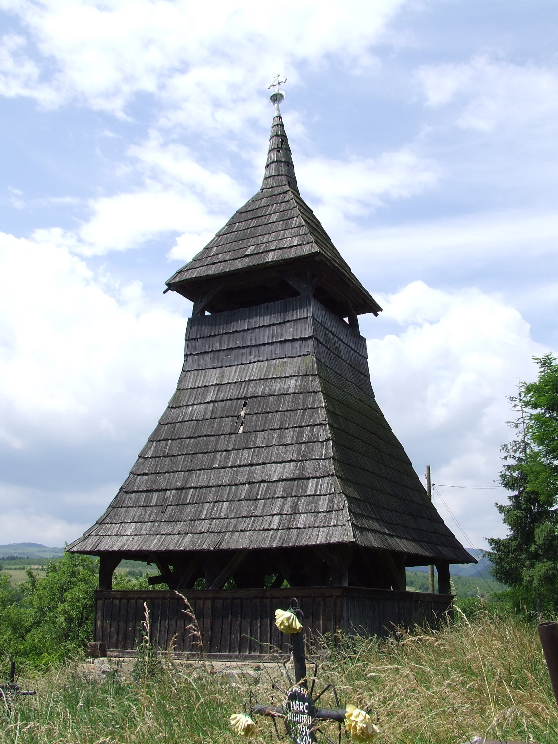 Biserica de lemn din Finişel. Clopotniţa.